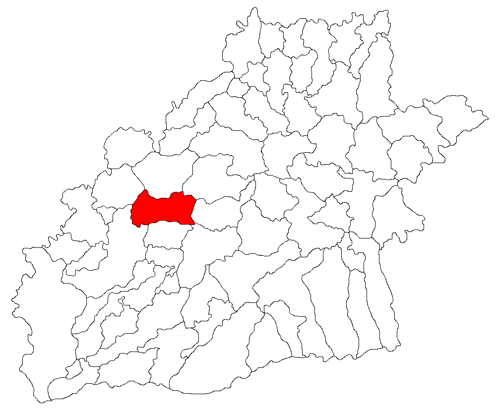 Categorie:Hărţi ale judeţului Sibiu Licensing Categorie:Imagini din Transilvania